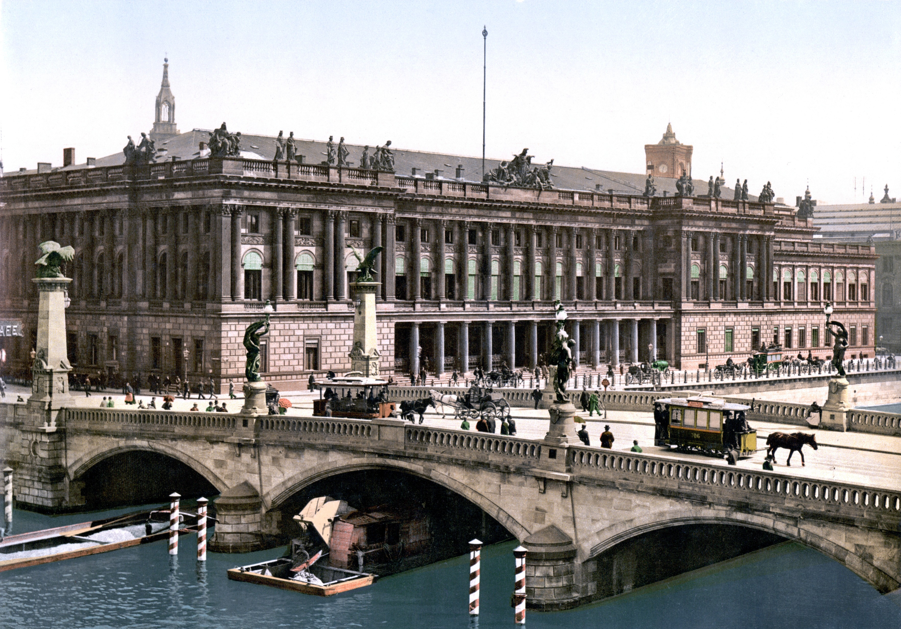 Berlin Börse mit Friedrichsbrücke um 1890